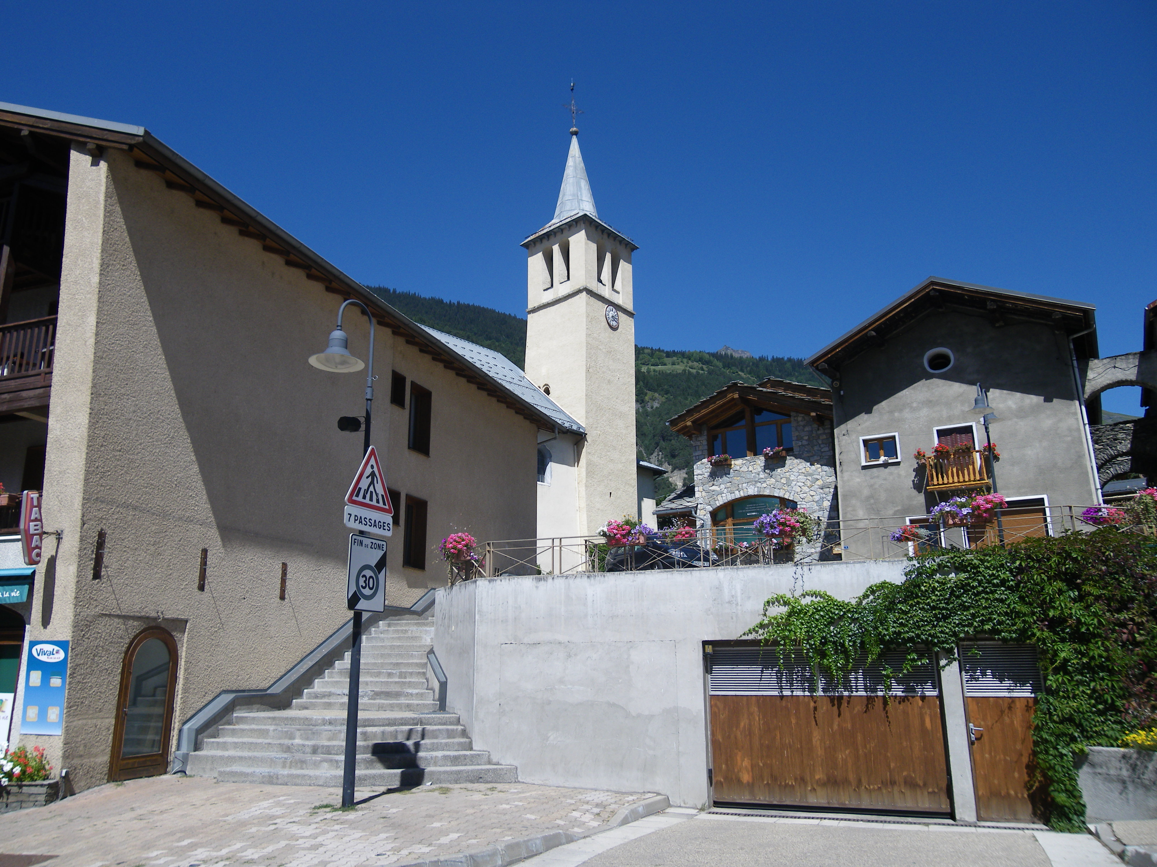 l'eglise de Seez